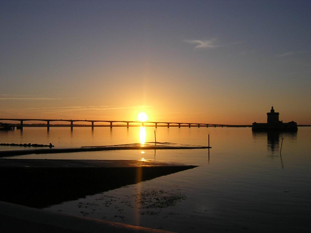 Pont de l'Île d'Oléron (Charente Maritime). Vue générale embrassant l'ensemble du Coureau d'Oléron, séparant l'île du continent. Au second plan, le Fort du Chapus. Crédit : Office de Tourisme de Bourcefranc